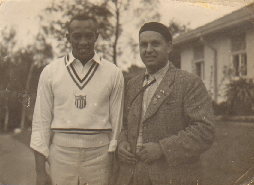 Rodac sa Dzesi Ovensom Olimpijada u Berlinu 1936